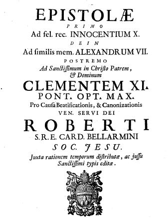 Deposizioni per la causa di beatificazione di San Roberto Bellarmino (Frontespizio)